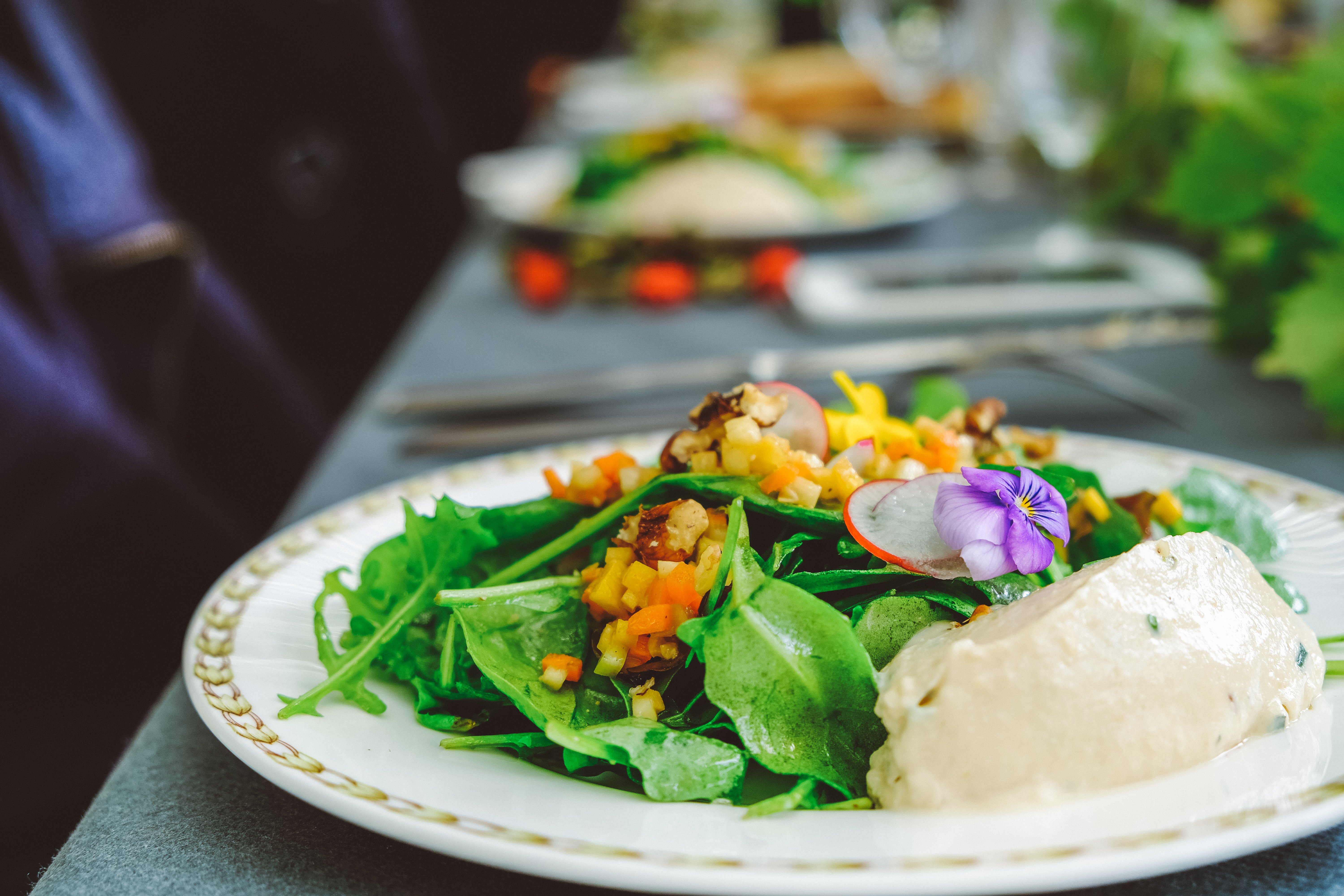 Vegan dish